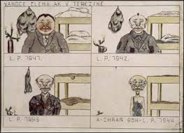 Pavl Fantl Metamorphose